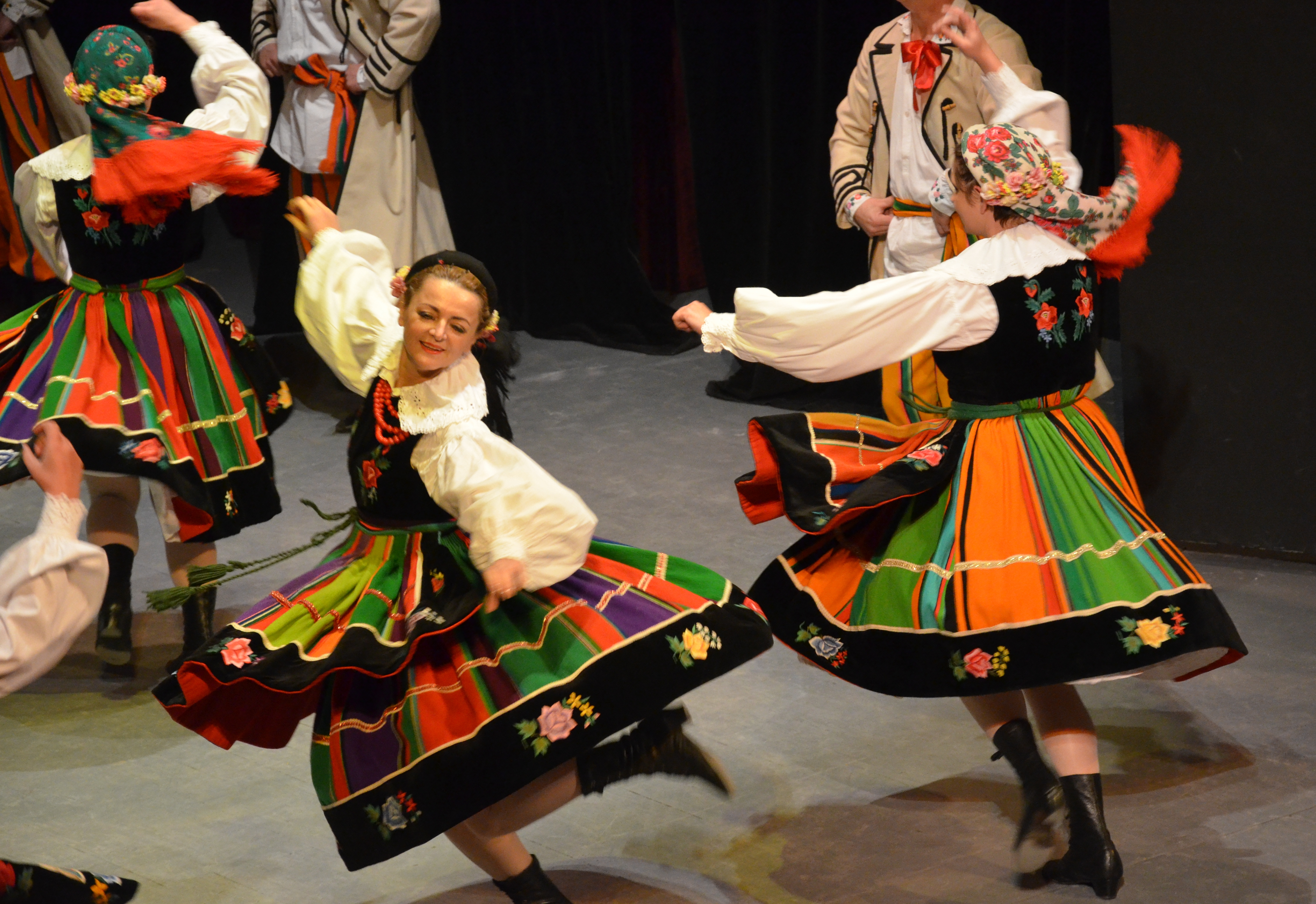 Kostüme zum Oberek